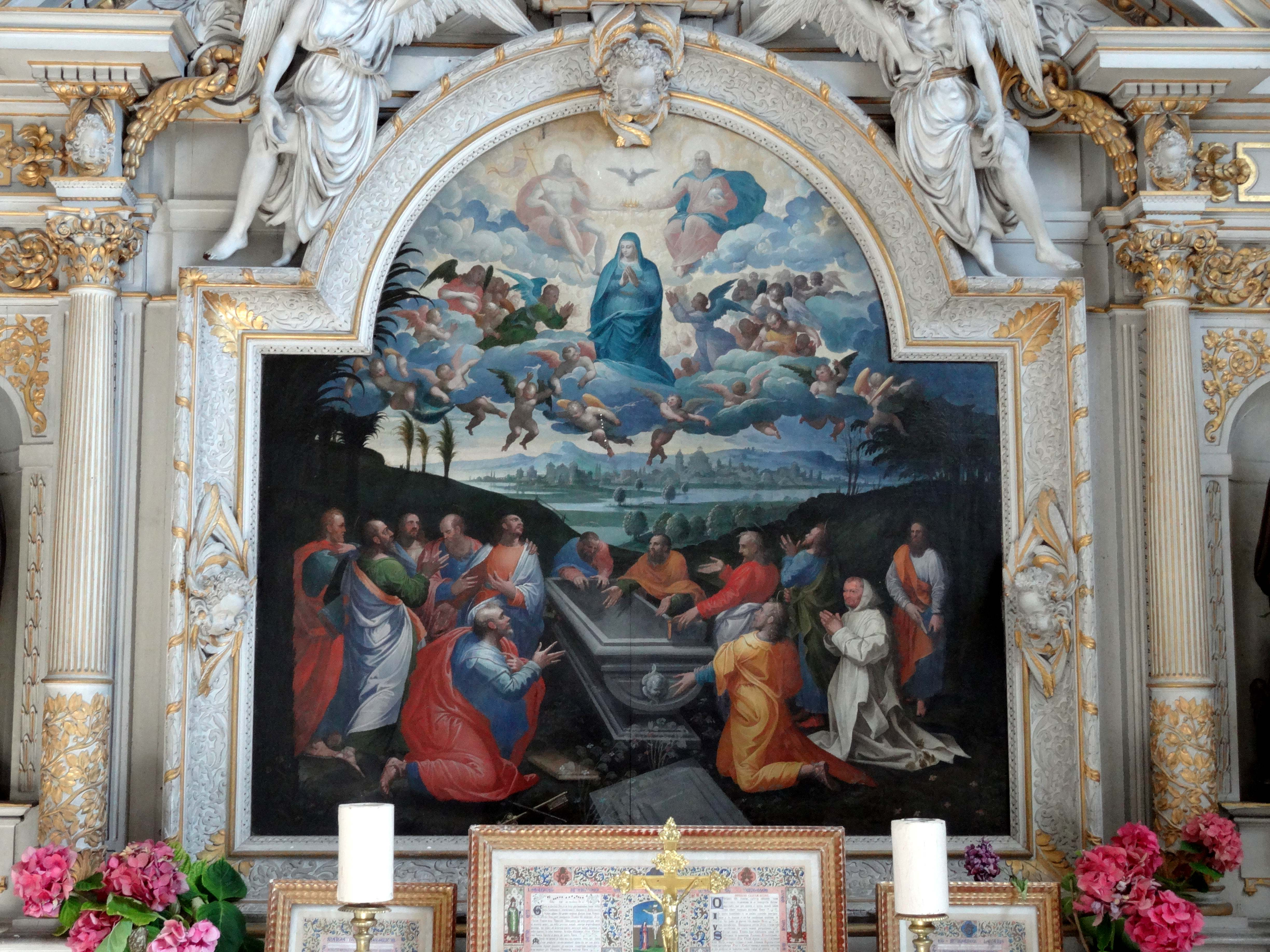 Retable latéral sud, tableau - l'Assomption, par Henri Lerambert, daté de 1591.